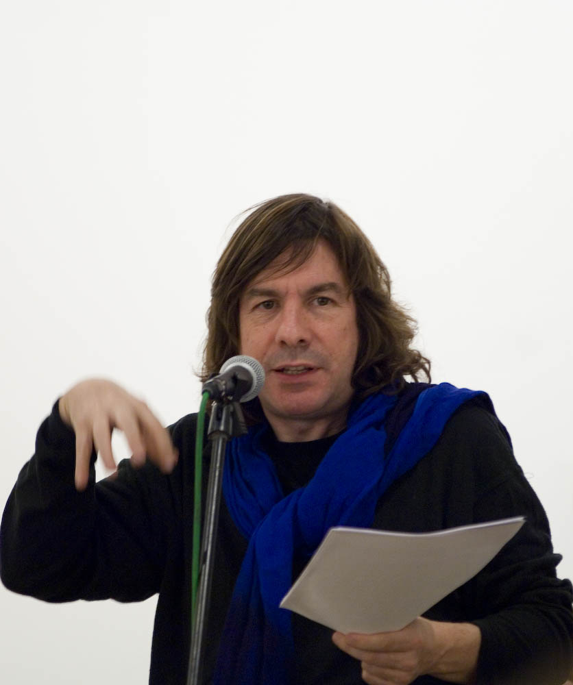 Còdols, la Biennal de poesia Catalana : Dimecres 24 d’octubre de 2007, “Poetes joves amb premis grans”. Còdols reuneix Núria Martínez-Vernis, Jordi Valls i Àngels Gregori en un recital presentat per Víctor Sunyol. Al Museu d’Art de Cerdanyola Can Domènech, a Cerdanyola del Vallès, a les 8 del vespre.